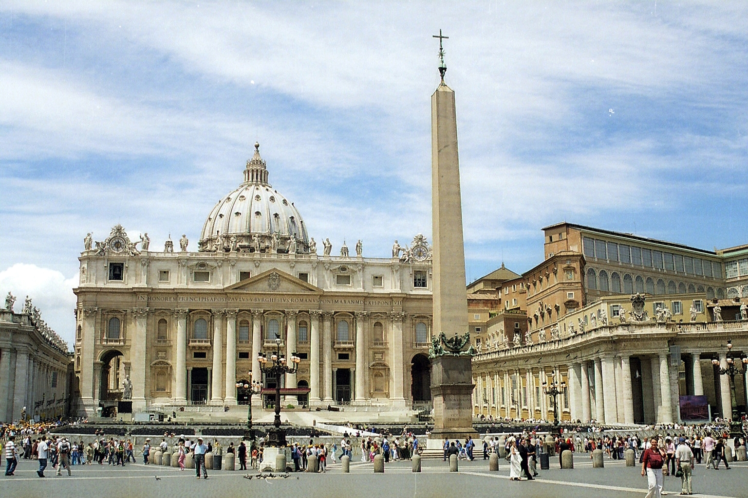 Saint Peter's Square